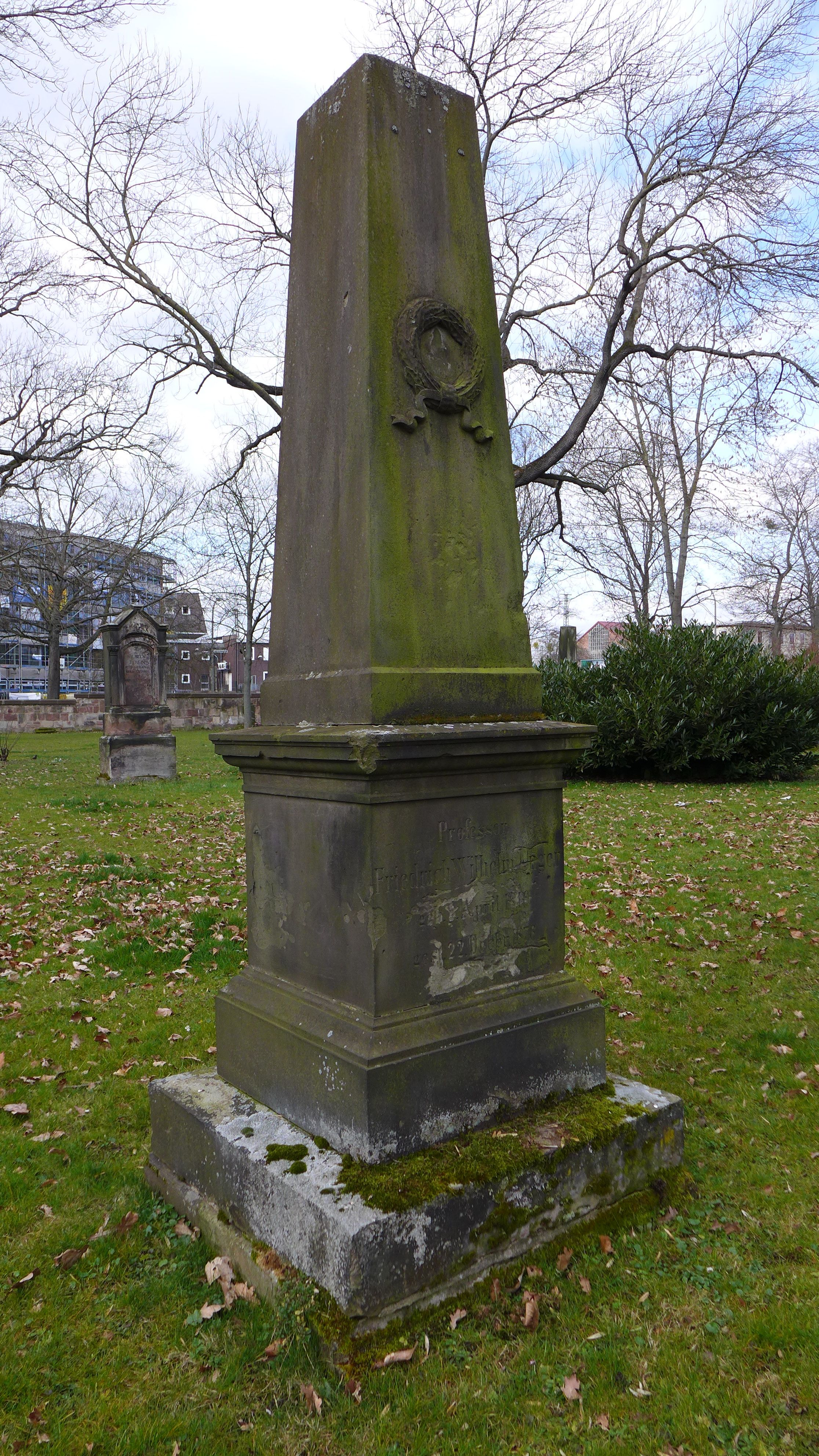 Unger Grabmal